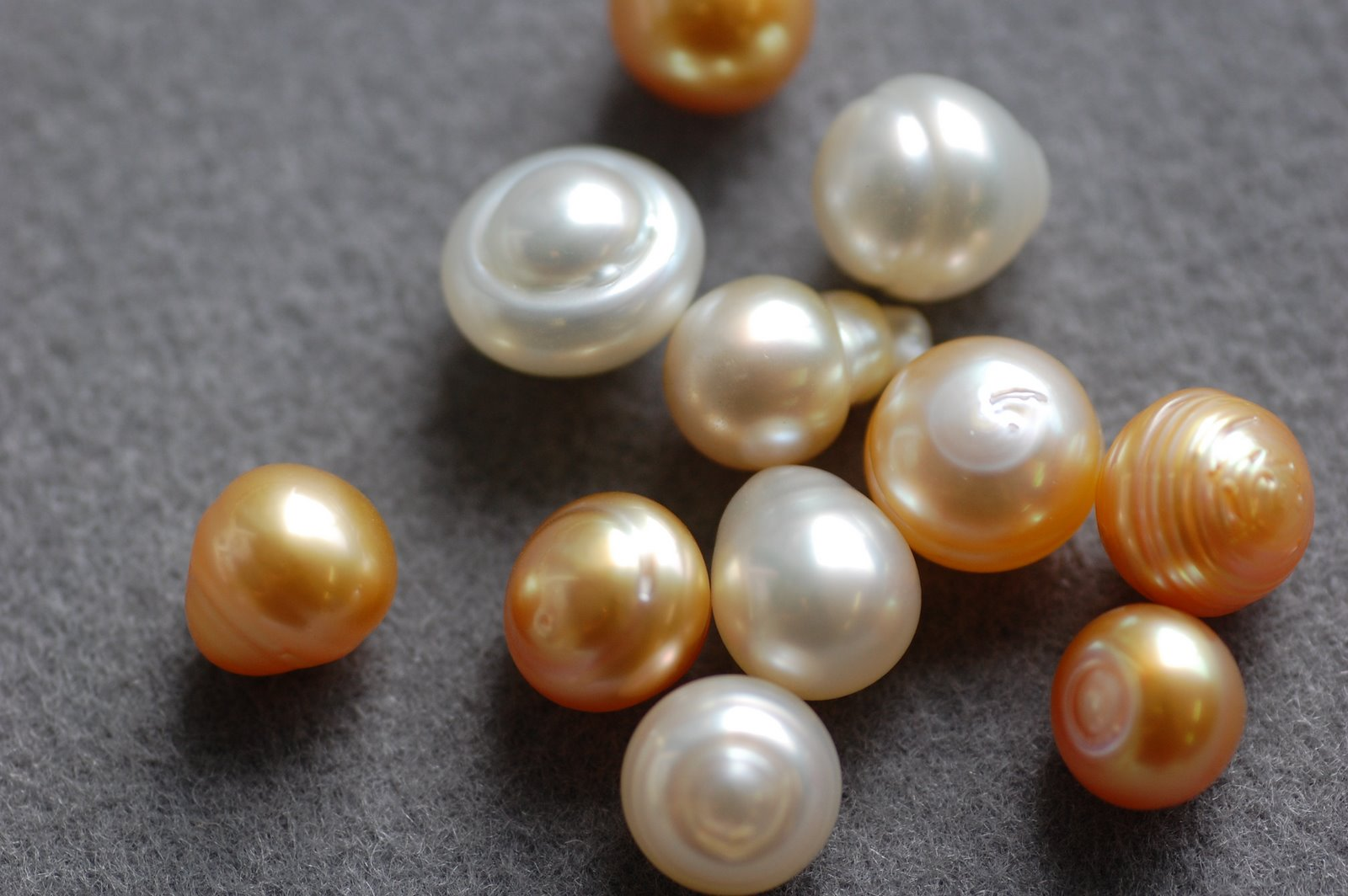 インドネシア南洋真珠のサークル君, インドネシア